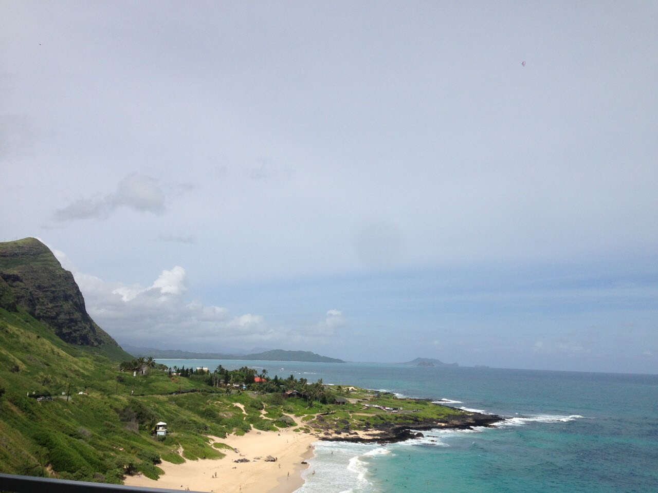 カイルアビーチ(2014年11月)